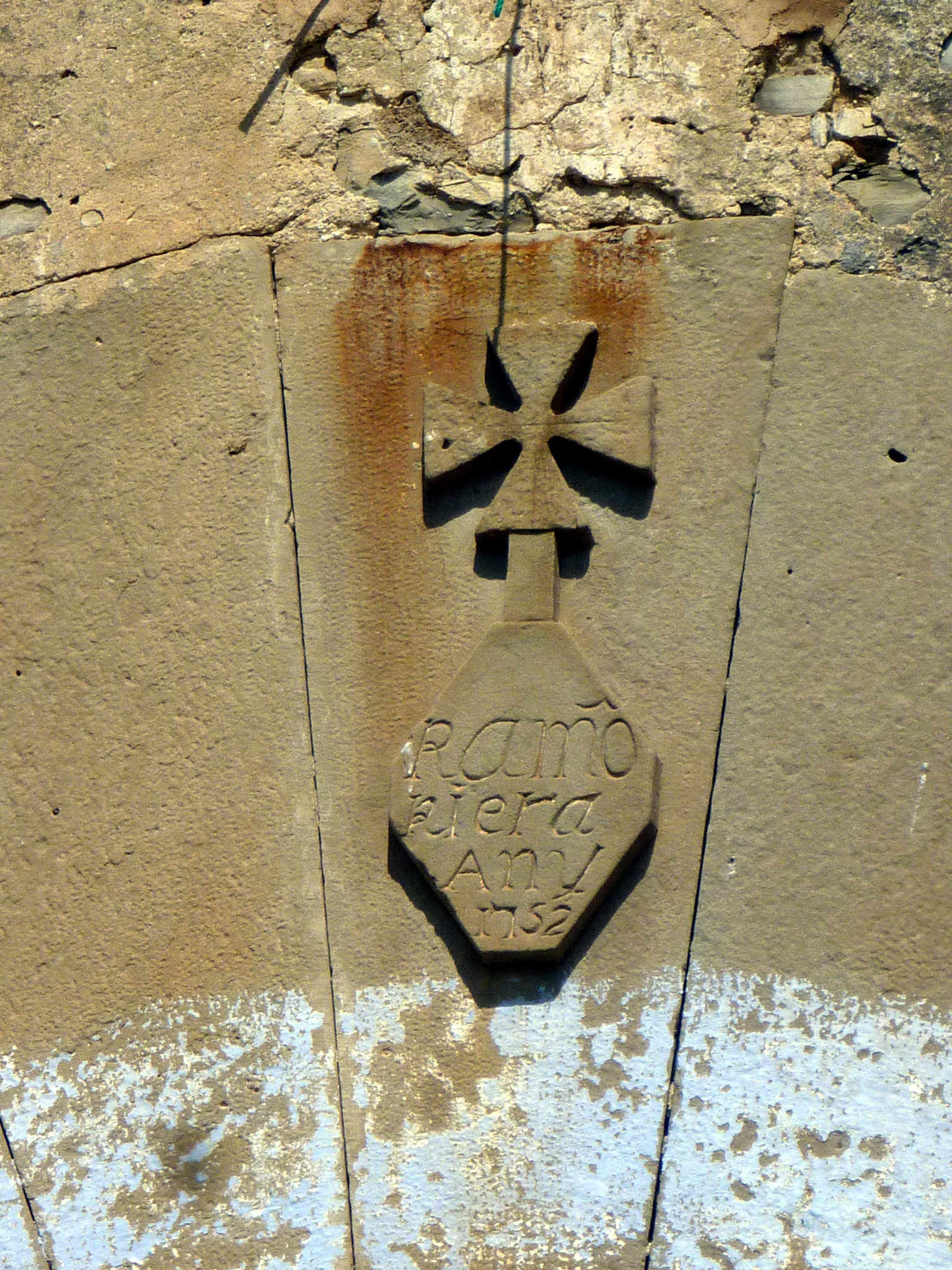 Can Casanova de Montfalcó el Gros (Veciana): clau del portal